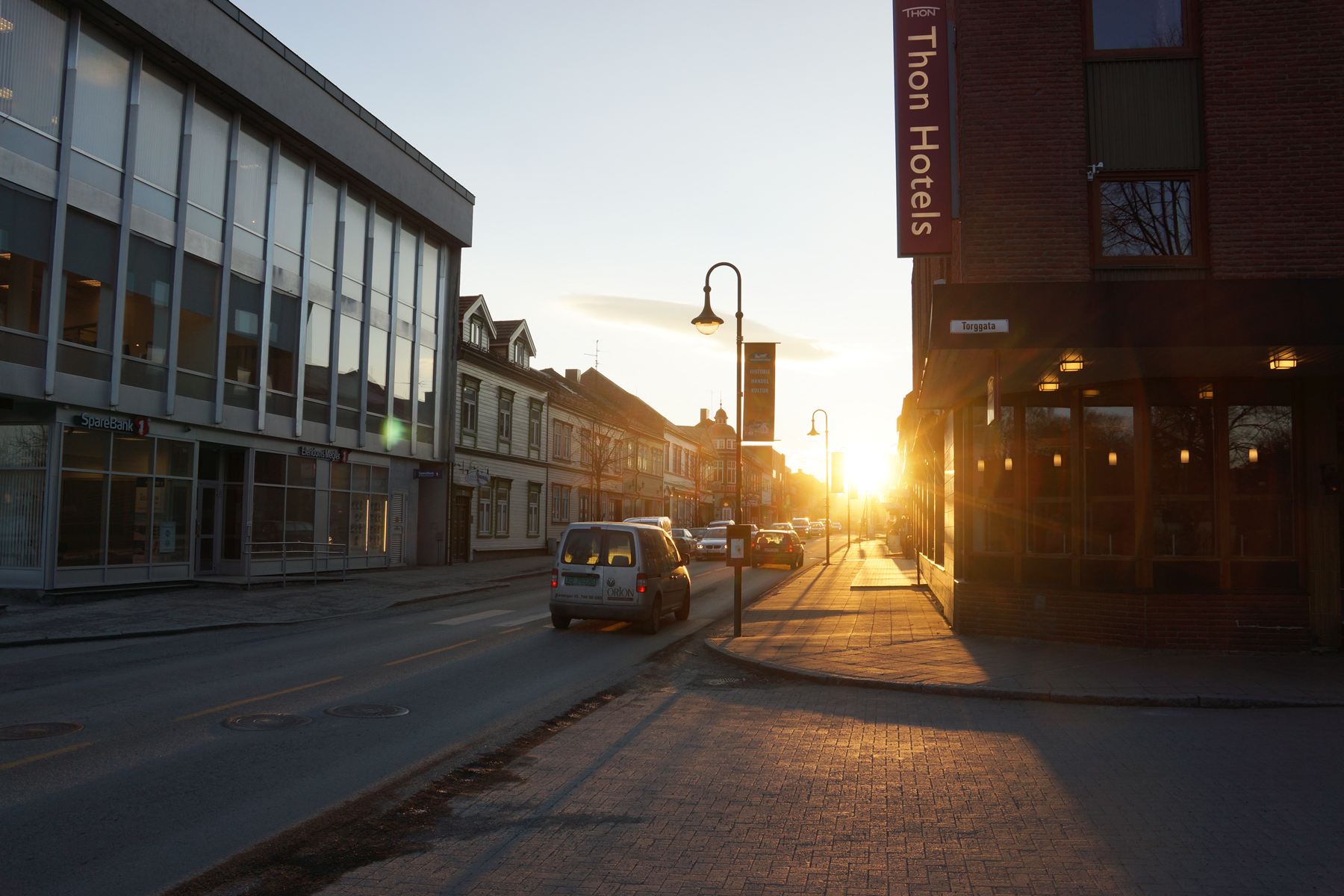 Kirkegata i Levanger i retning kirka, januar 2014